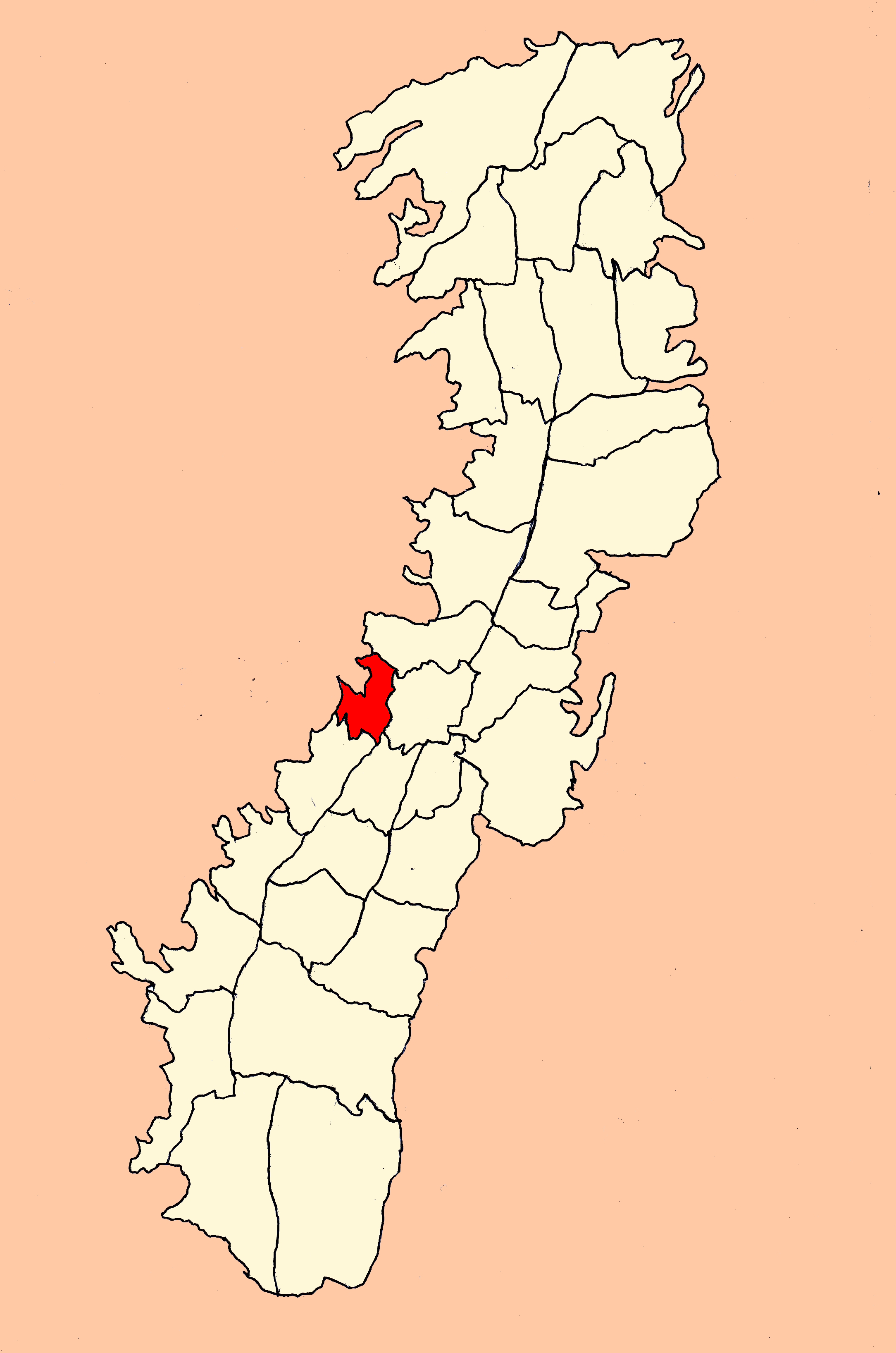 Parroquia La Libertad (Quito, Ecuador)